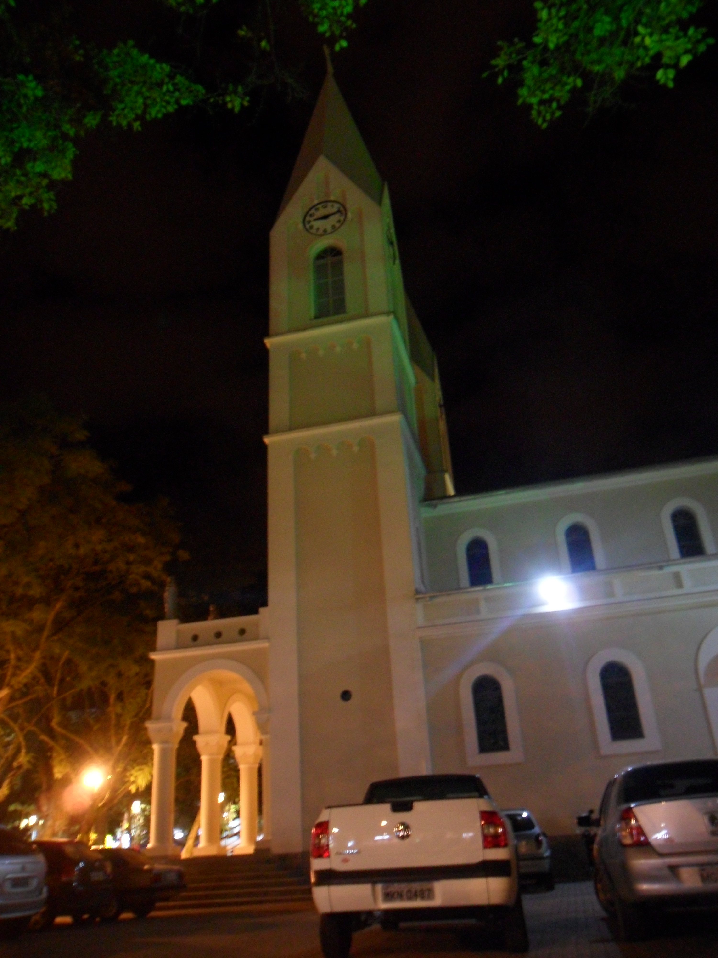 Catedral São José, Criciúma, SC.